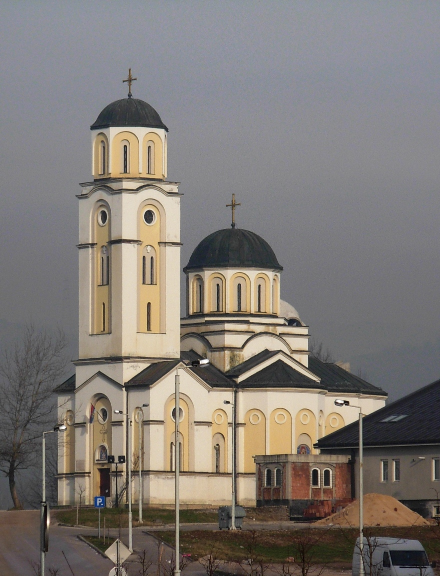 Crkva Svetog Vasilija Ostroškog u Dobrinji.